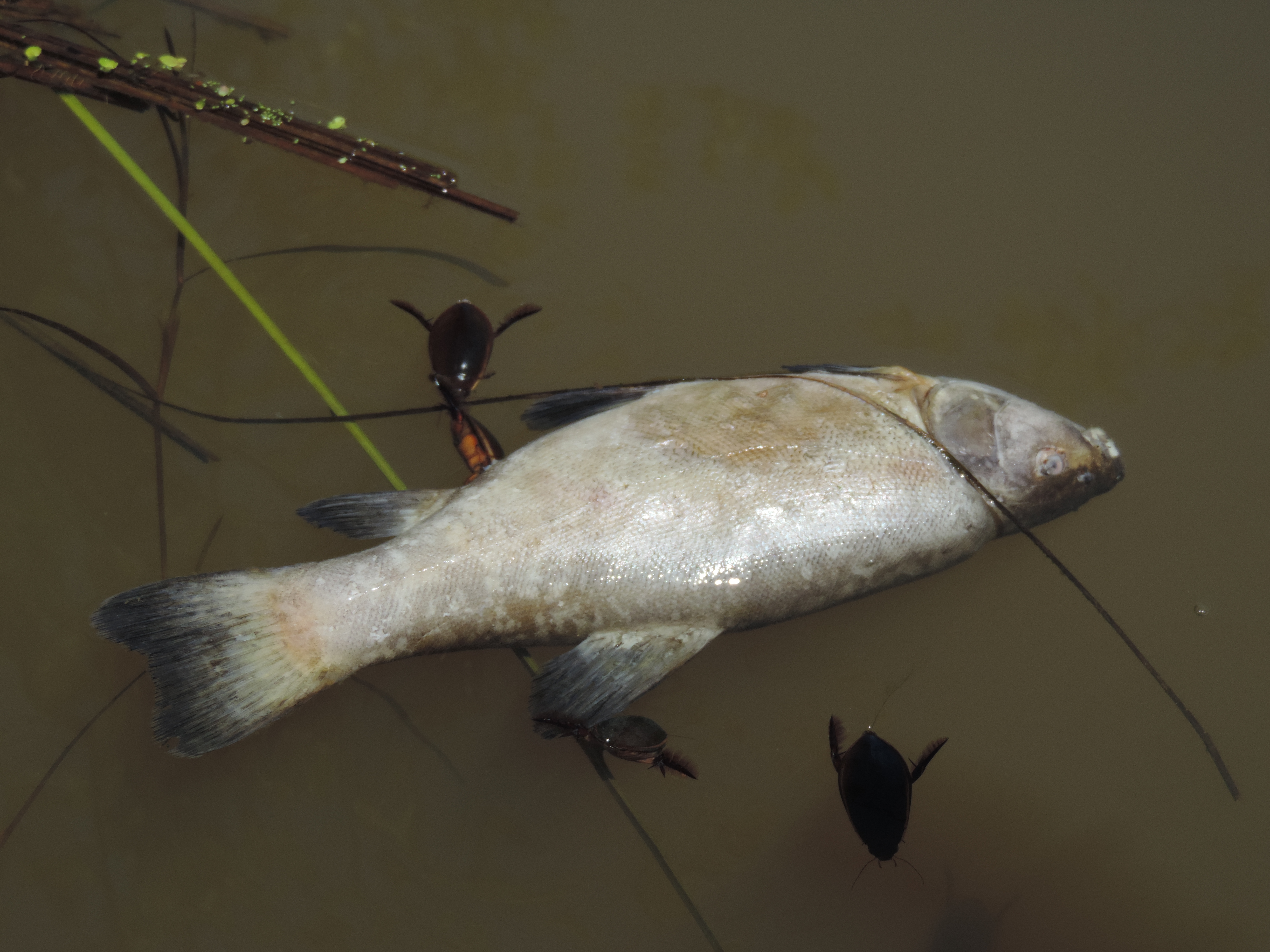 Acarlar longozu, fish death due to pollution)